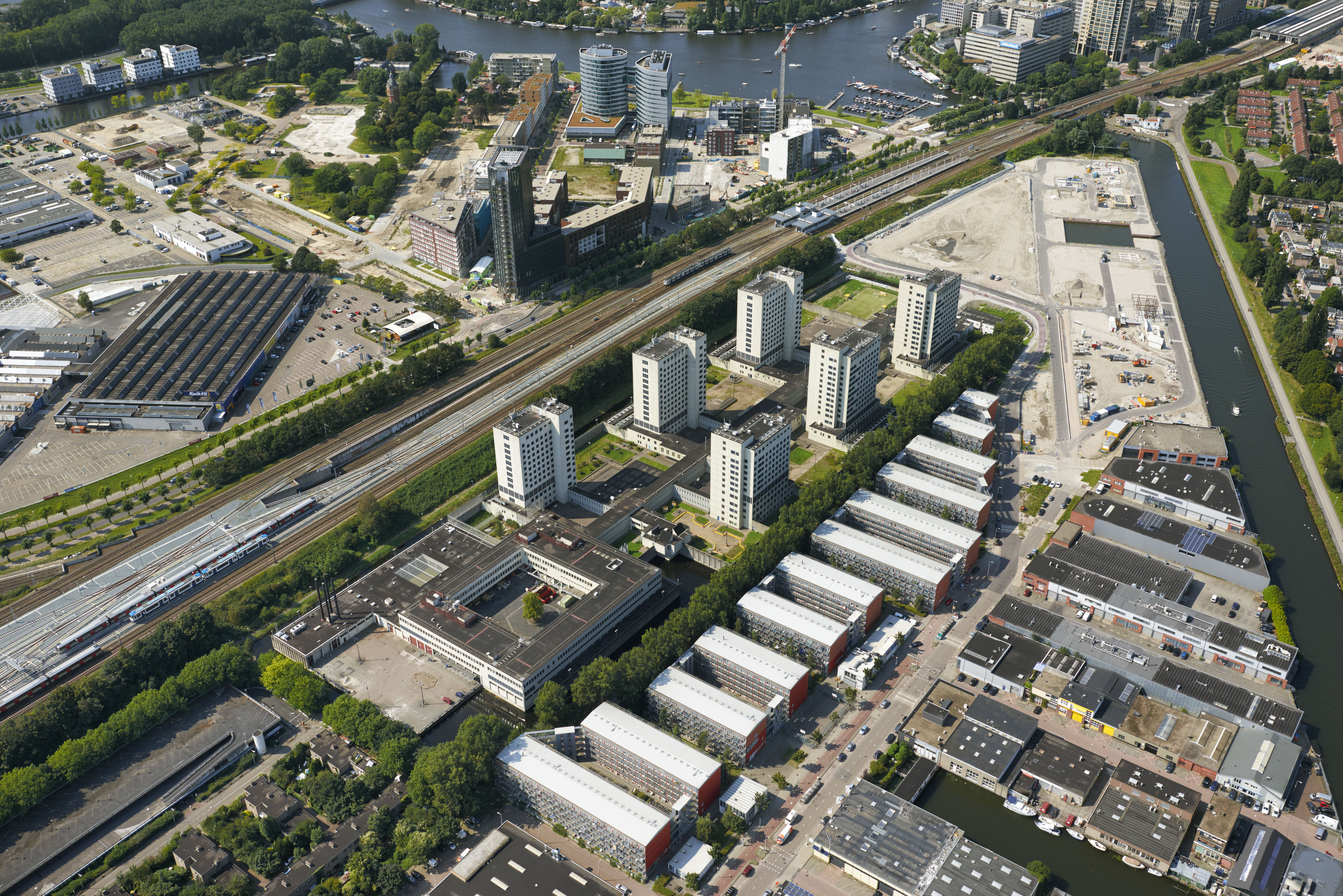 Penitentiare Inrichting Amsterdam Over Amstel, Amsterdam.De Penitentiare Inrichting Amsterdam Over Amstel (Bijlmerbajes) is per 1 juli 2016 gesloten. Het Rijksvastgoedbedrijf zal het complex van 7 hectare als één geheel via een openbare verkoopprocedure verkopen en het is de bedoeling dat op het terrein een nieuw stuk stad ontwikkeld wordt dat voor 70% uit woningen zal bestaan. Het complex is opgezet volgens een zogenaamd ‘telephone pole-model’: een gevangenistypologie bestaande uit een centrale verbindingsstraat (in de Bijlmerbajes de ‘Kalverstraat’) met vertakkingen naar cellenpaviljoens en voorzieningen. foto: Marco van Middelkoop/Aerophoto-Schiphol